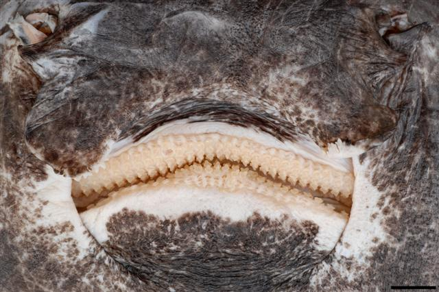 голотип длиной 89,5 см